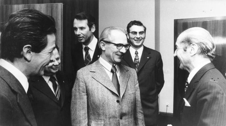 ADN-ZB/Mittelstädt/4.12.1973 Berlin: Essen in der Botschaft Anläßlich des Besuches des Generalsekretärs der IKP in der DDR, Enrice Berlinguer (l.) , und seiner Begleiter gab der Botschafter der Italienischen Republik in der DDR, Enrico Aillaud (r.) ein Essen. Der Einladung des Botschafters waren gefolgt: der Erste Sekretär des ZK der SED, Erich Honecker (M.), die Mitglieder des Politbüros und Sekretäre des ZK der SED Hermann Axen (2.v.l.) und Werner Lamberz (2.v.r.) sowie weitere Persönlichkeiten.